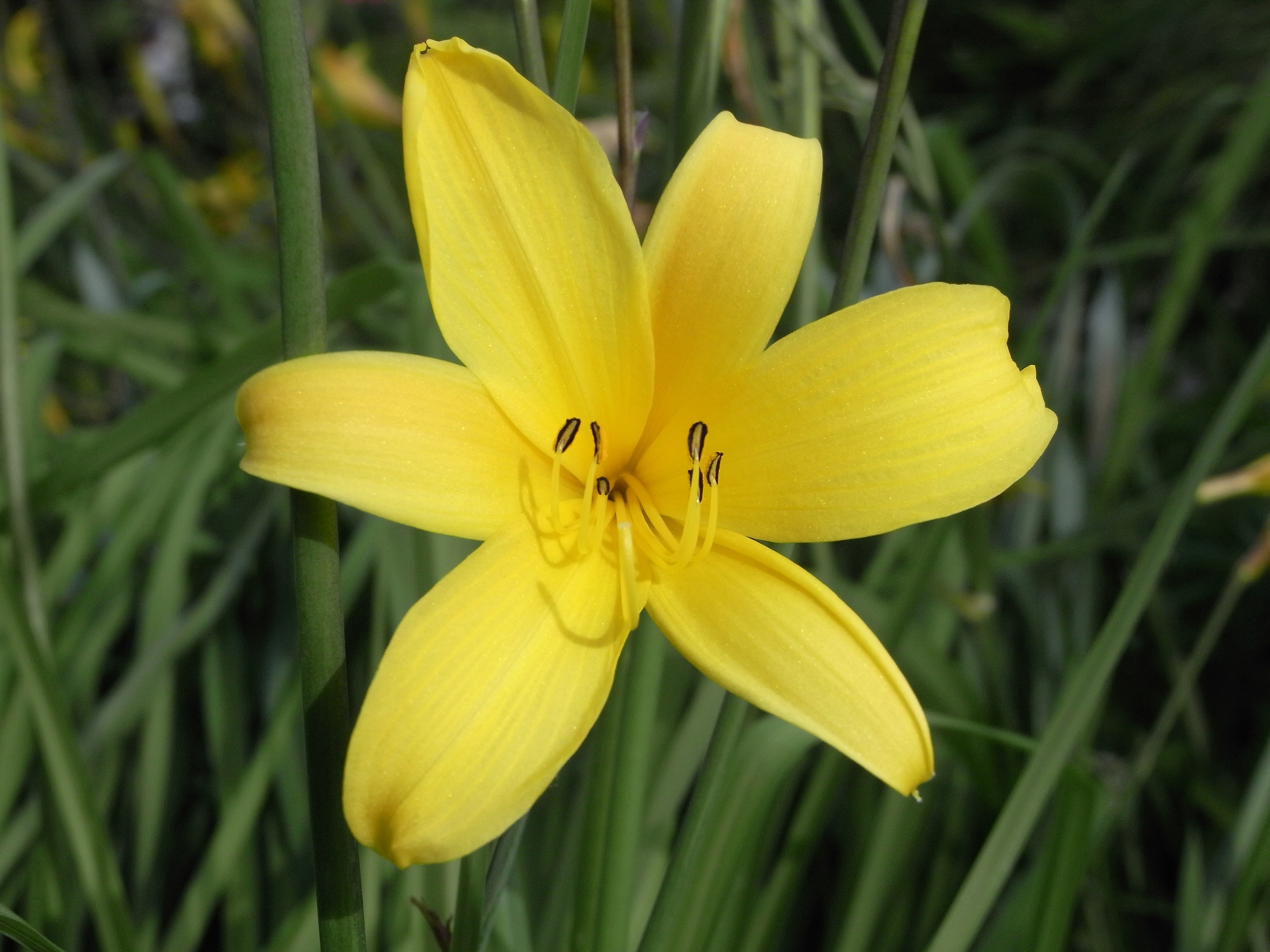 Taglilie